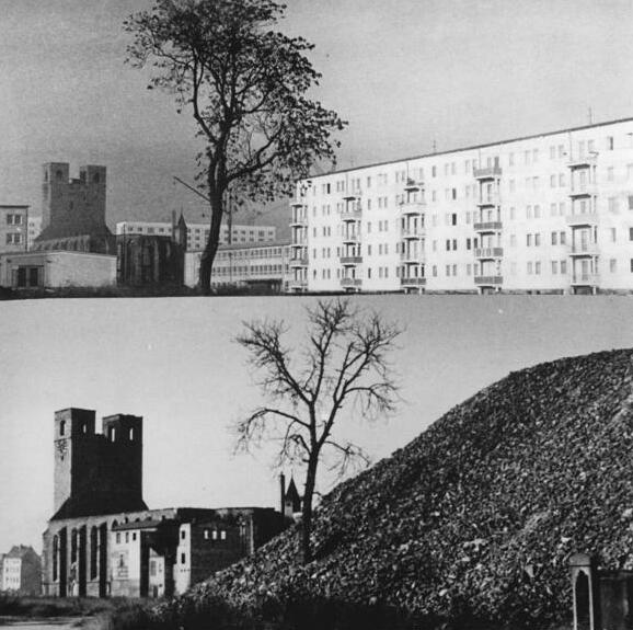 Zentralbild Biscan Qu 7.1.1964 Anläßlich des Jahrestages der Zerstörung Magdeburgs: Am 16. Januar 1945, enige Tage vor Kriegsende, erfolgte der große angloamerikanische Bombenangriff, dem fast die gesamte Innenstadt Magdeburgs zum Opfer fiel. 800 Bomber luden 1000 Luftminen, 12000 Sprengbomben und 200000 Brandbomben über derStadt ab. Magdeburg hatte nach jener grauenvollen Nacht 16000 Tote, 24648 Verwundete und 244560 Obdachlose zu beklagen - fast das ganze Stadtzentrum lag in Trümmern.- Der Wiederaufbau der zerstörten Elbestadt, für den die regierung der DDR alljährlich viele Millionen DM zur Verfügung stellt, hat besonders in der letzten Zeit große Fortschritte gemacht. UBz: Blick auf die Katherinen-Kirche, eine der 15 Kirchen, die am 16. Januar 1945 zerstört bzw. schwer beschädigt wurden. In der Kirche befand sich in den ersten Jahen nach dem Kriege einer der großen trümmerberge (unten). Heute erheben sich dort helle Wohnblöcke (oben), weitere sind noch in Bau.